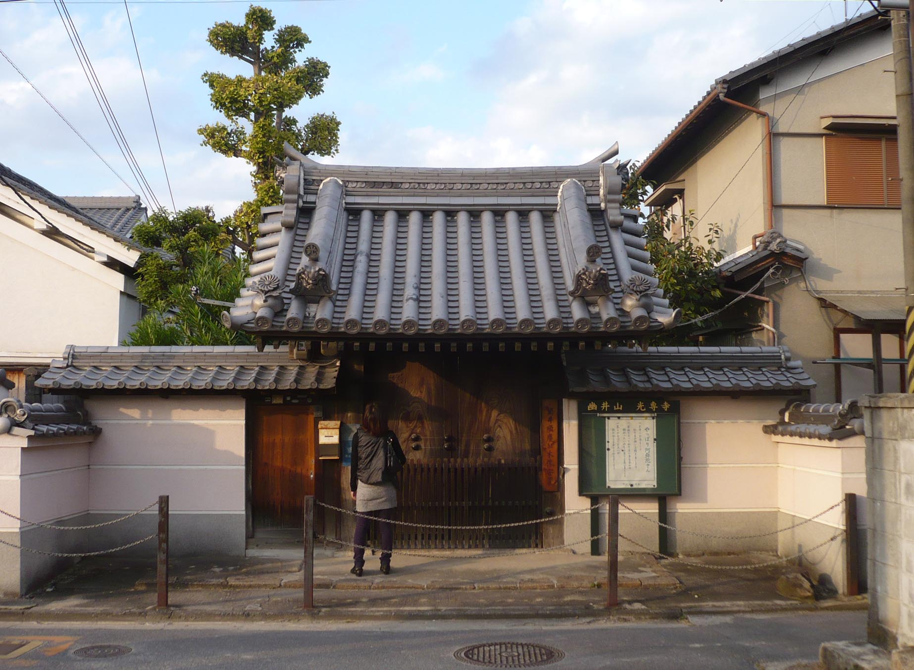 光専寺（大和郡山市）の山門